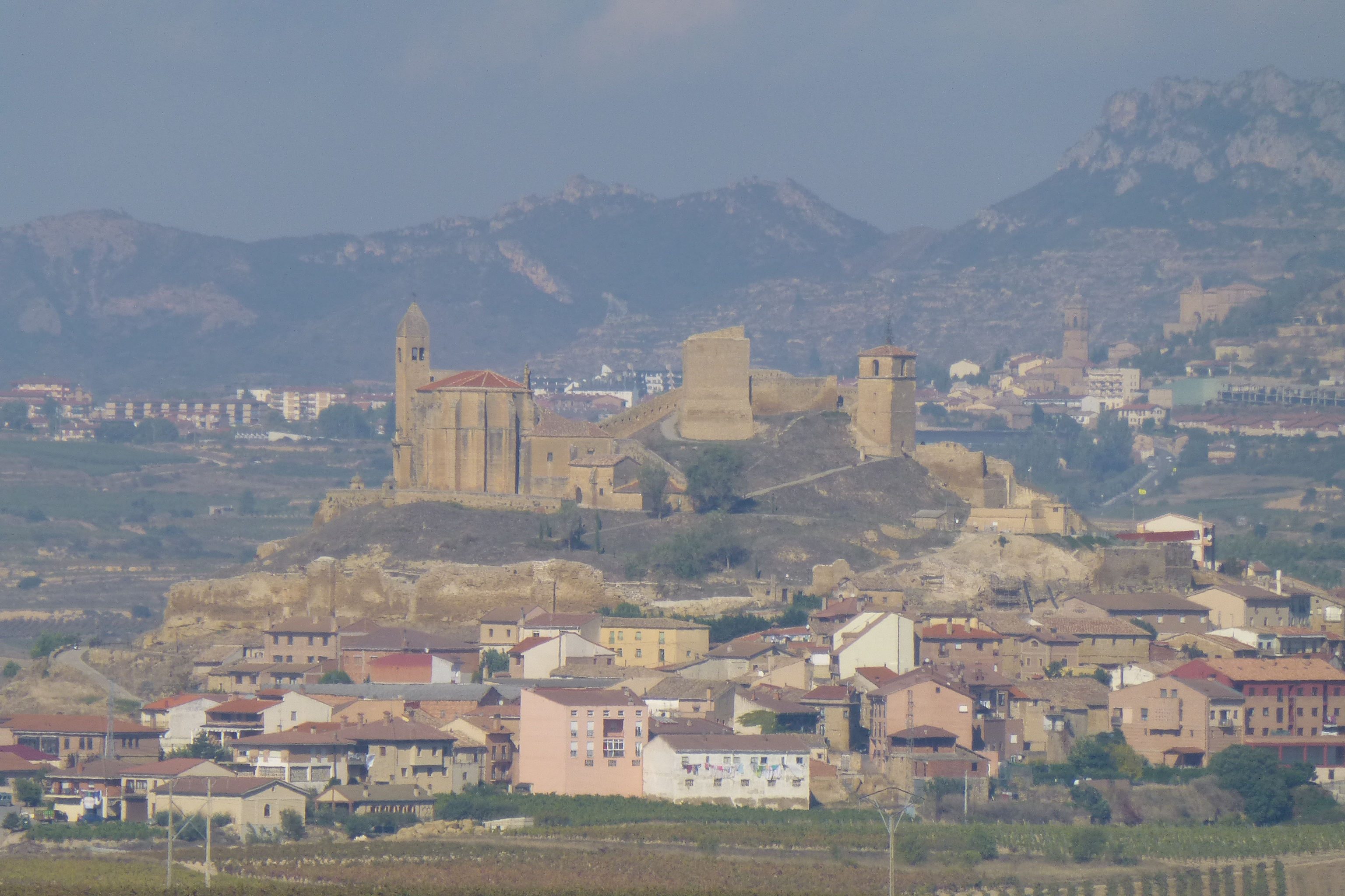 Vista de San Vicente de la Sonsierra en La Rioja España.